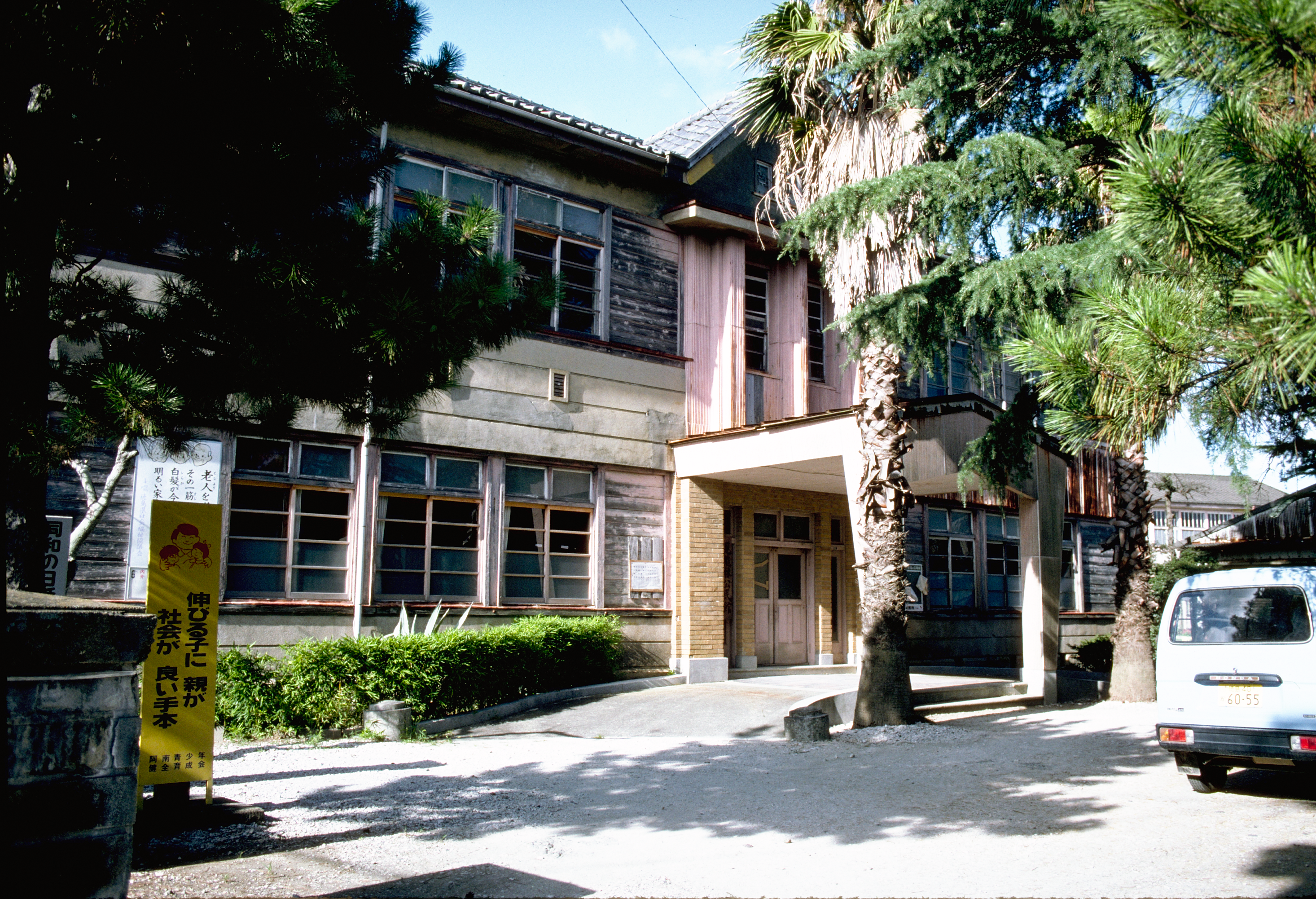 1985年当時の見能林公民館建物